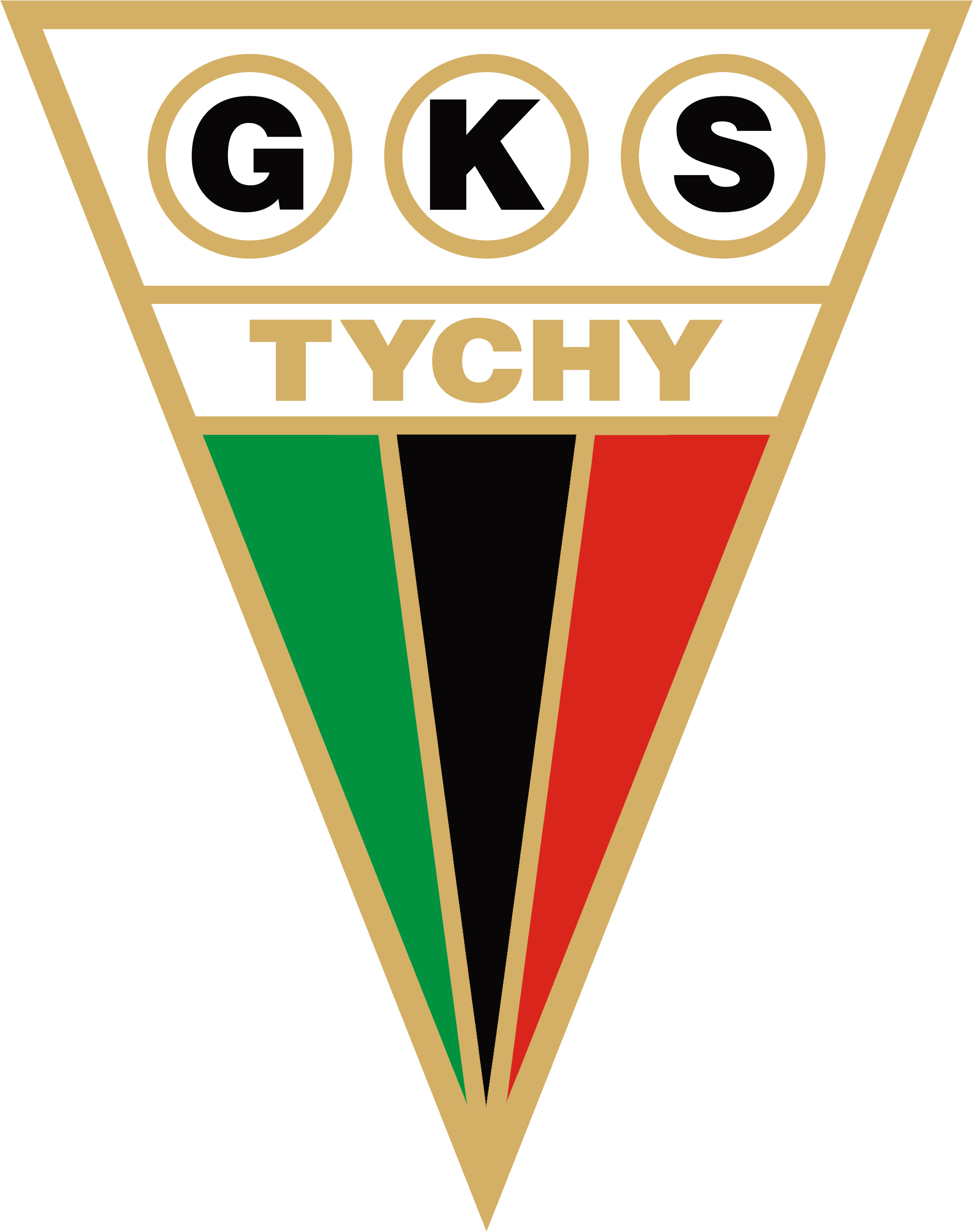 Хоккейный логотип